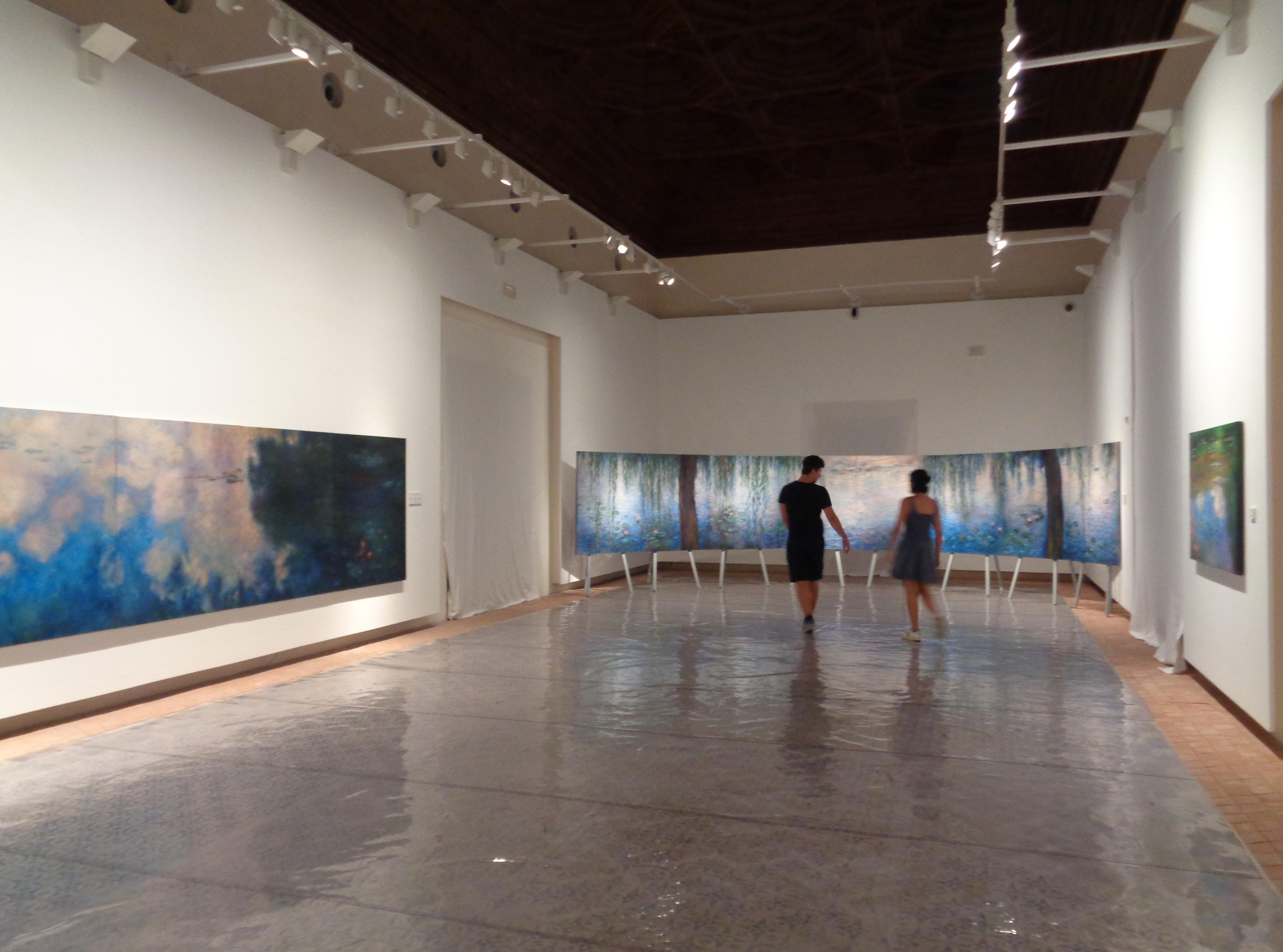 Interior del castell d'Alaquàs, els quadres del fons són còpies de quadres originals de Monet.